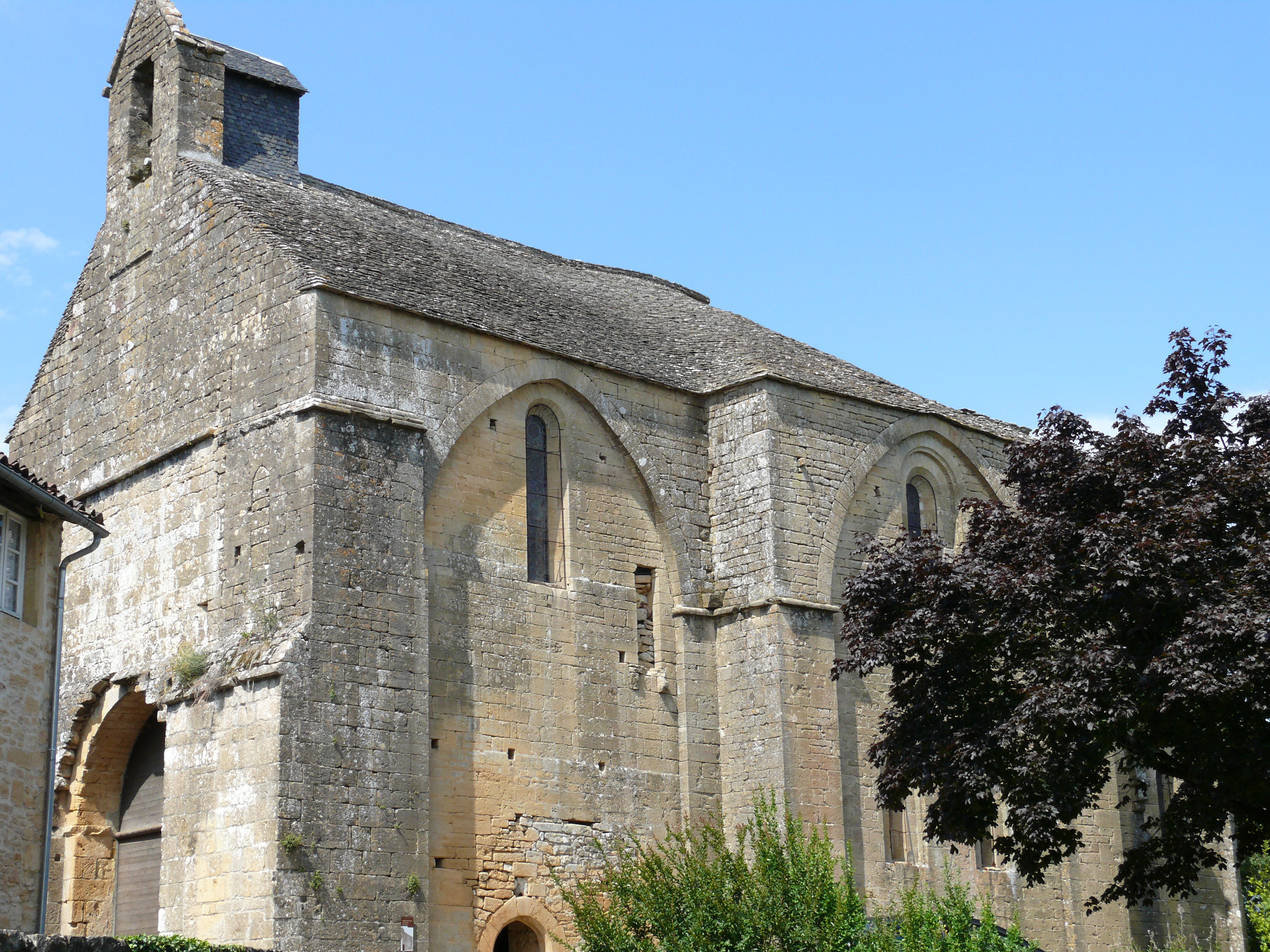 Sarlat-la-Canéda - Eglise Notre-Dame de Temniac